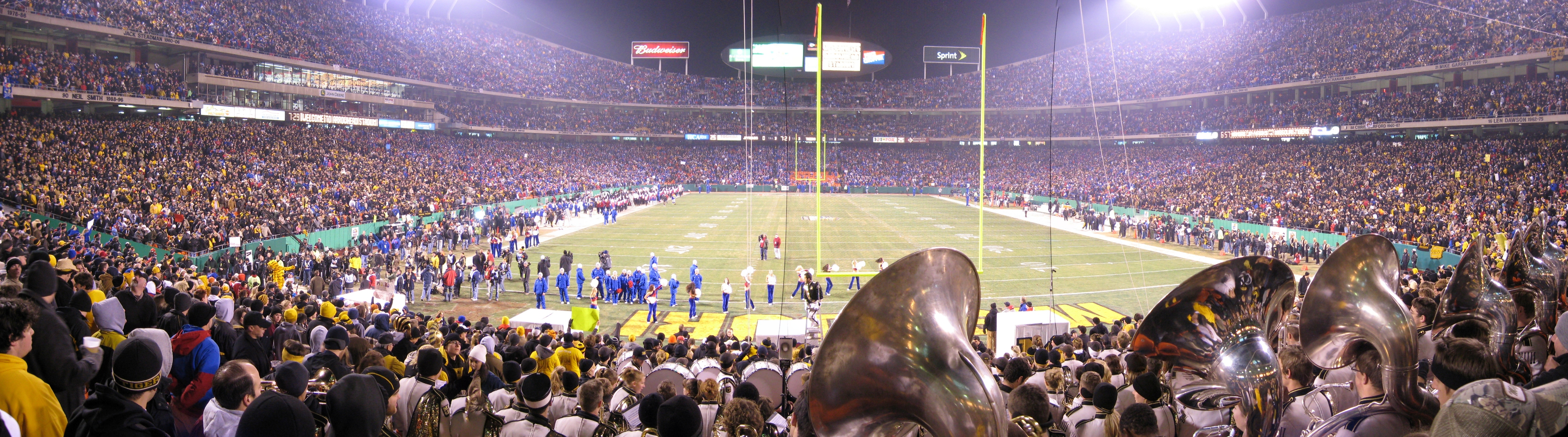 Vue panoramique du Arrowhead Stadium de Kansas City, MO. 2007 Border War entre Missouri et Kansas.